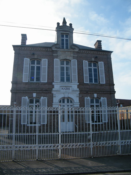 Vergies, Somme, Fr, mairie, ancienne école, bâtiment daté de 1883.